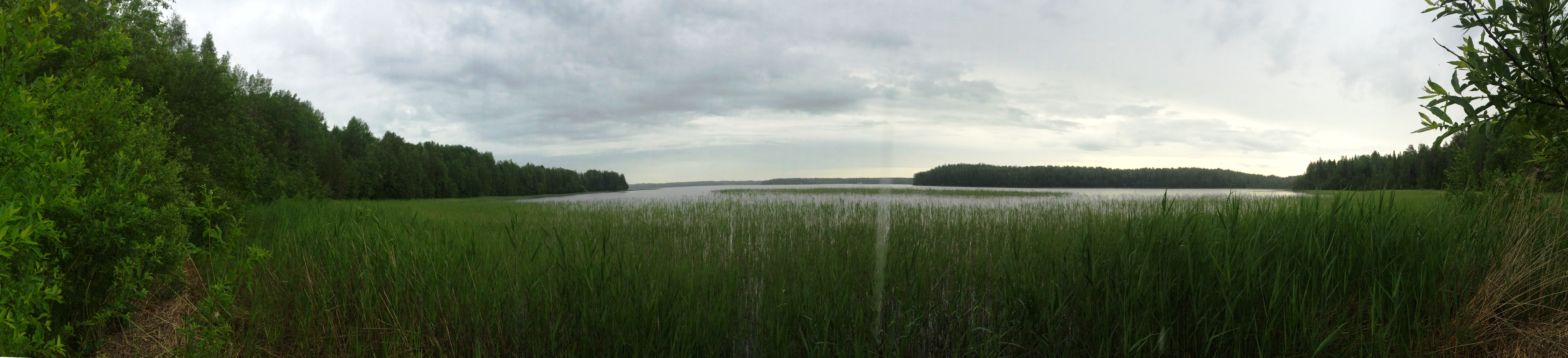 Остерозеро